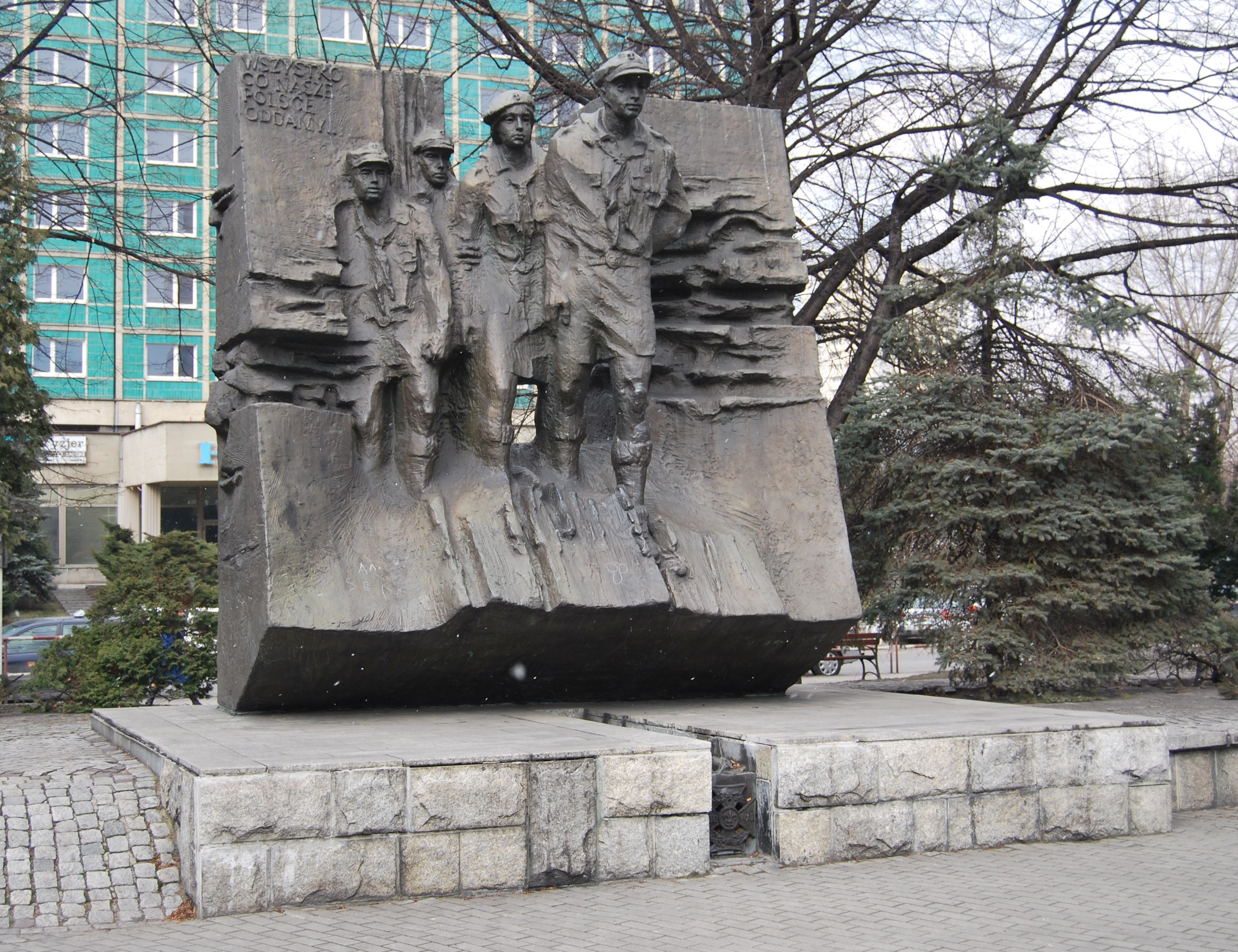 Pomnik harcerzy w Katowicach. Autorstwa Z. Brachmańskiego.